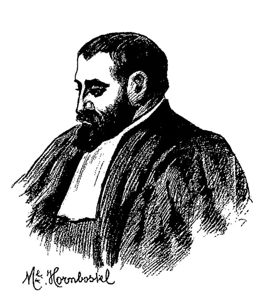 "M[aîtr]e Hornbostel".